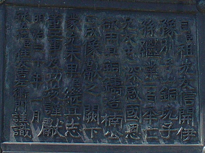 東京都千代田区皇居外苑（皇居前広場）にある楠公（楠正成）銅像背面２－文字版拡大